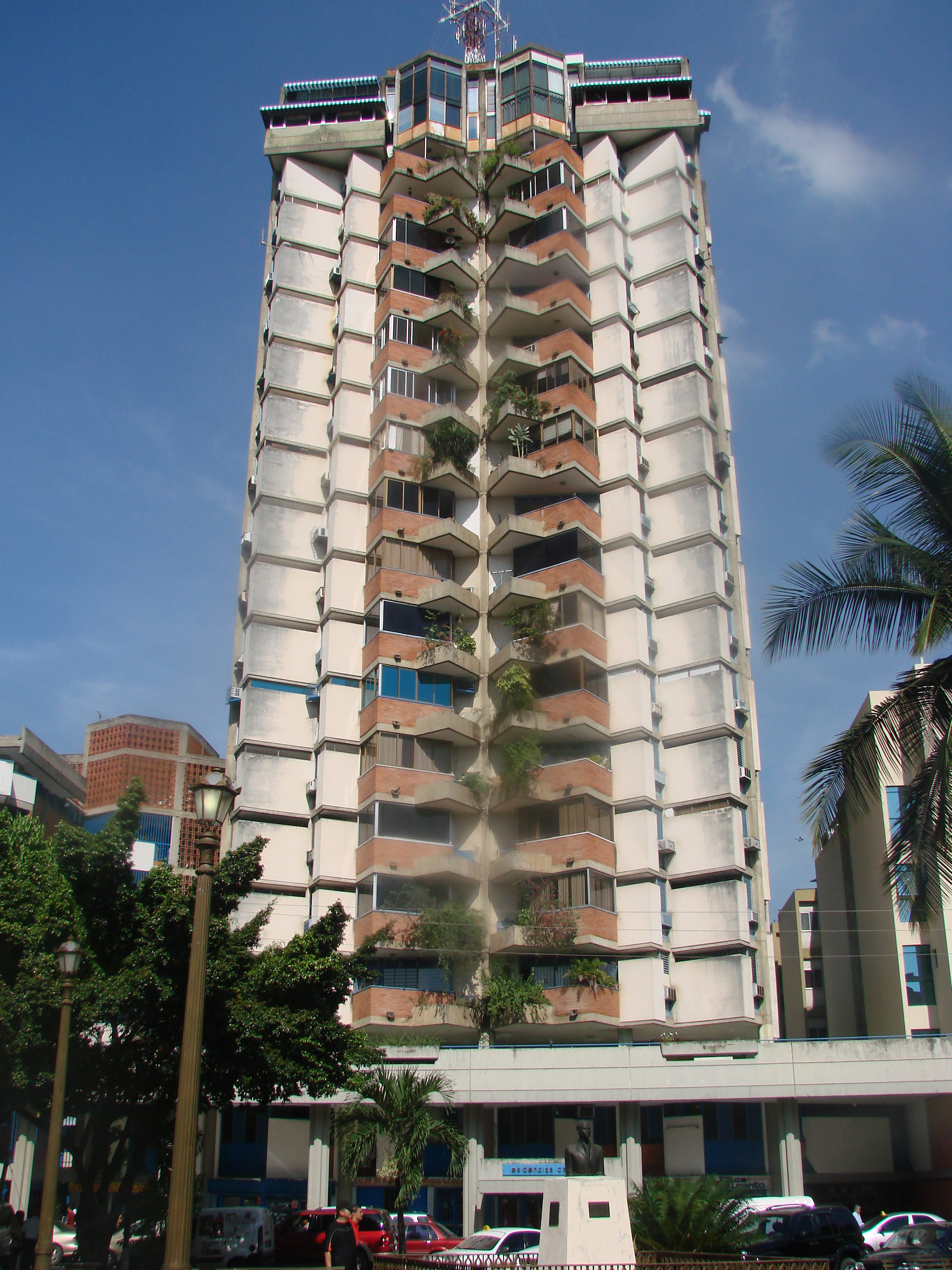 Maracay. Estado Aragua. Venezuela.